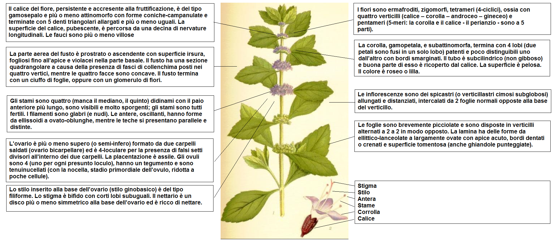 Mentha arvensis - Descrizione della pianta